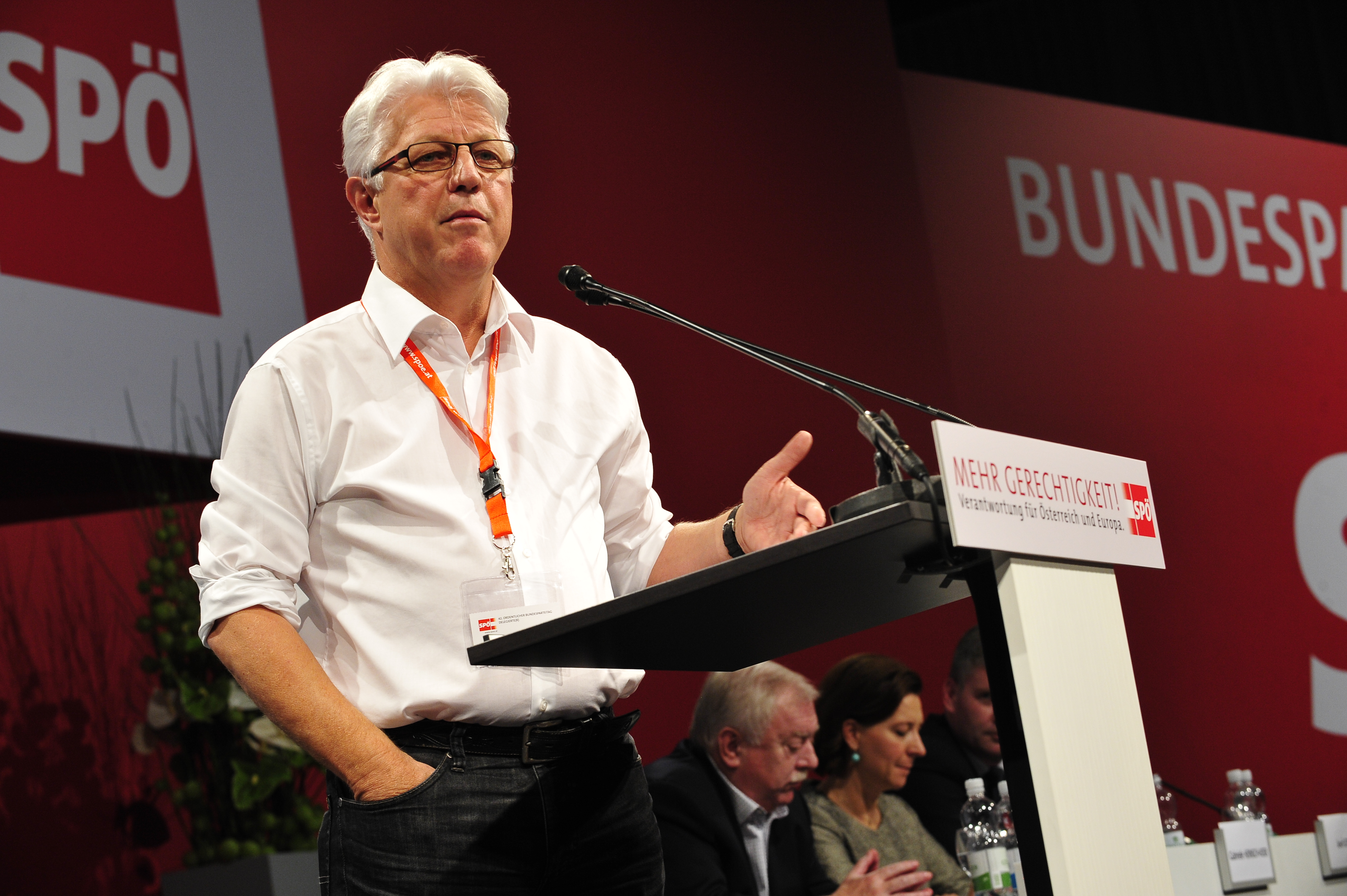 Gerhard Reheis am SPÖ-Bundesparteitag 2012. 13.10.2012 - VAZ St.Pölten